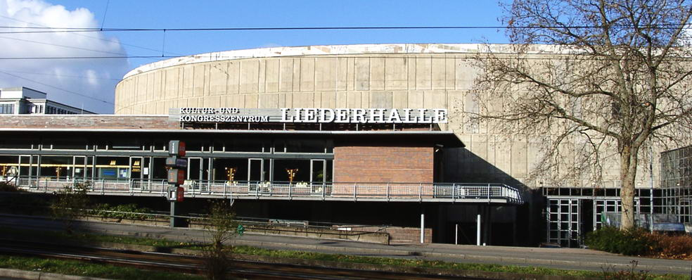 Stuttgart, Liederhalle von 1956, Beethovensaal